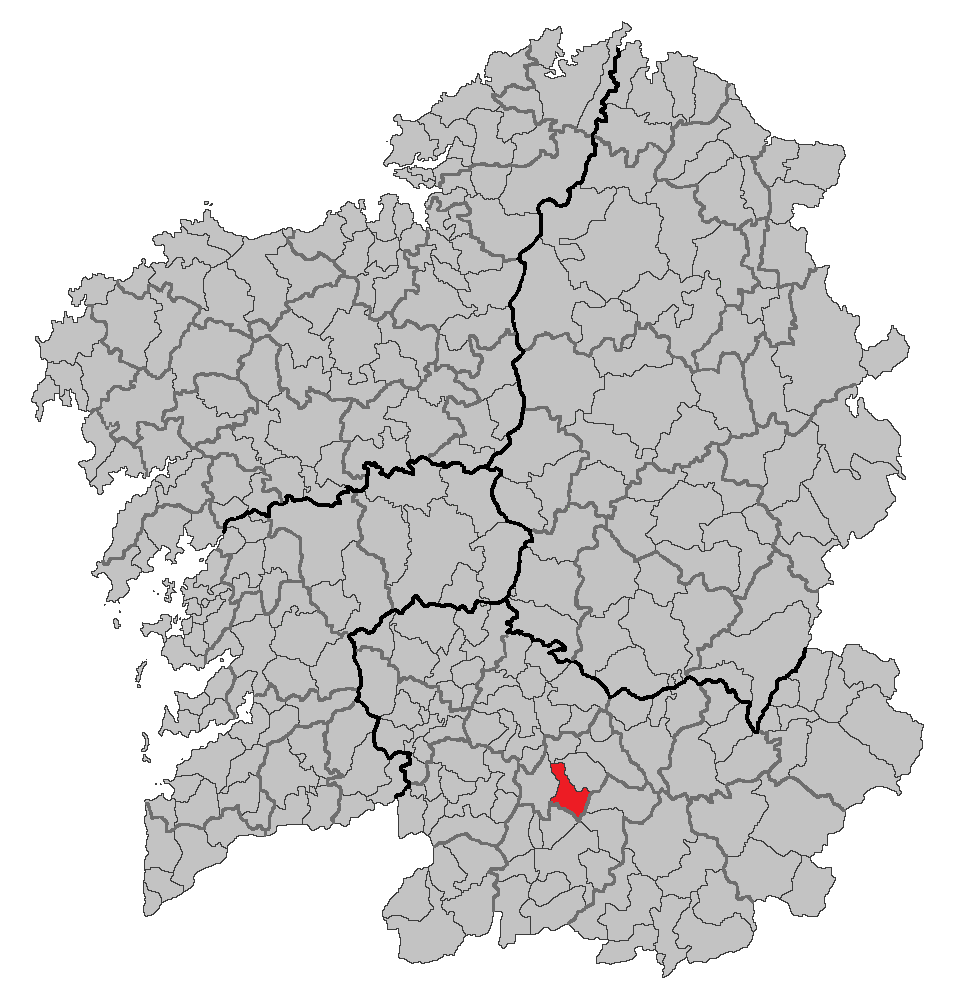 Mapa coa localización do concello de Xunqueira de Ambía.